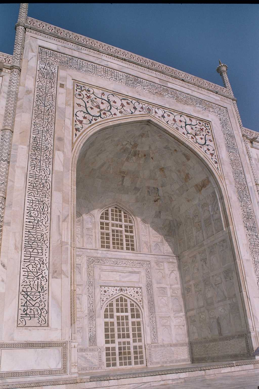 Taj Mahal in Agra, India. Picture take by Núria Pueyo, august 2005.